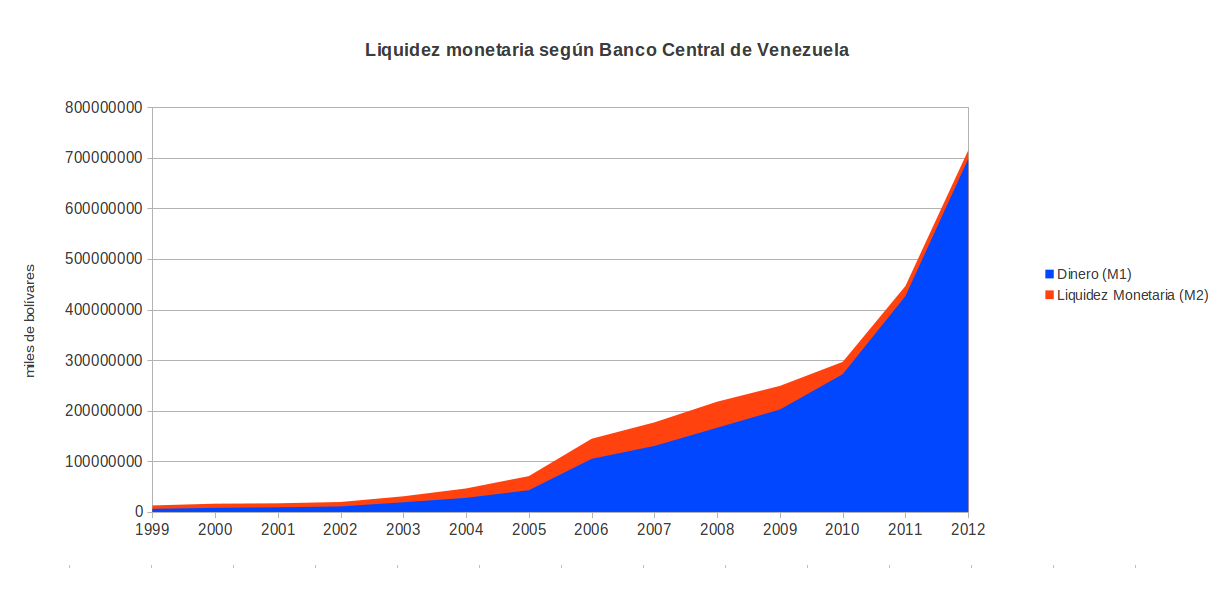 Liquidez monetaria según BCV en Venezuela